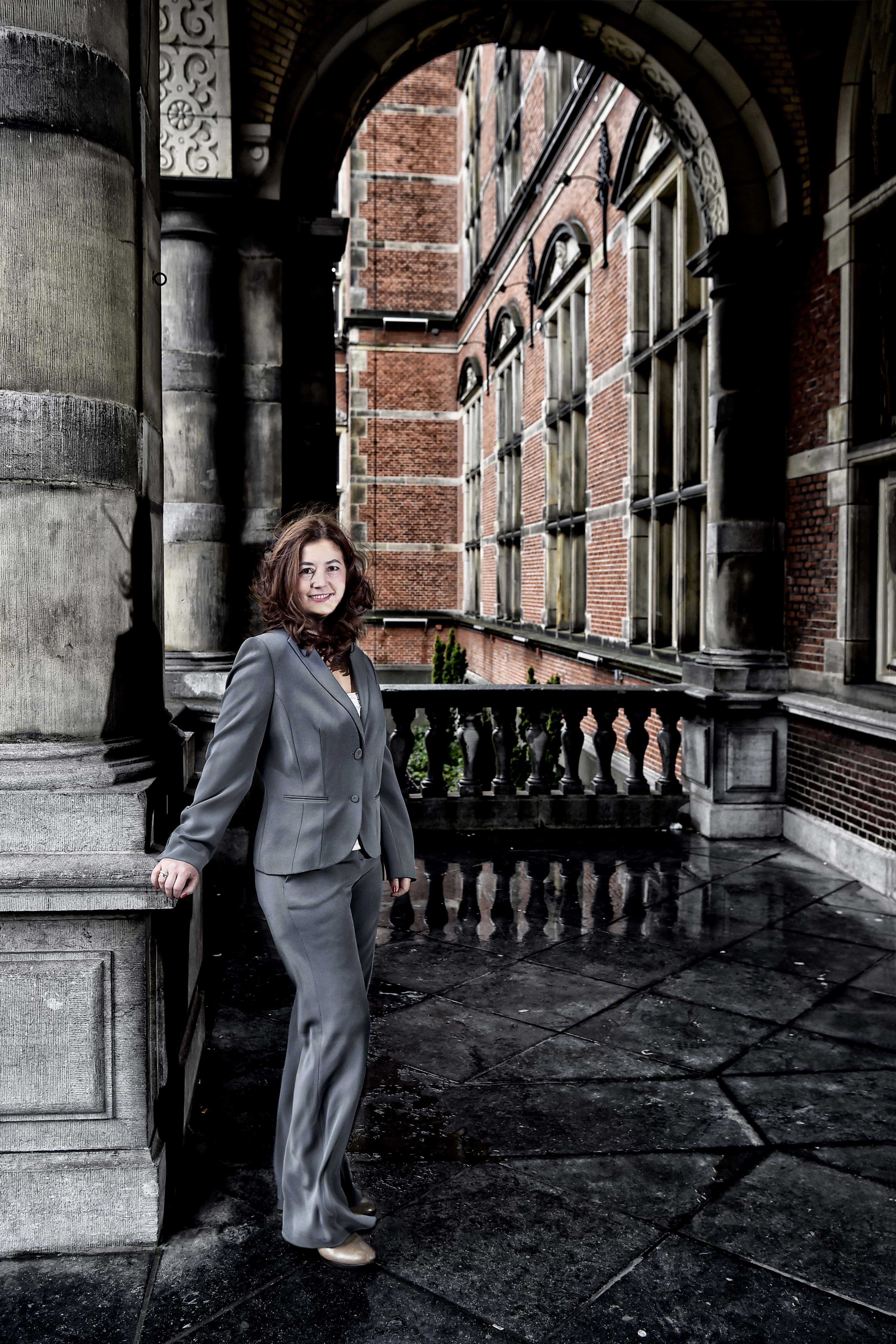 Dagmar Reichardt in occasion of the Summer School "Beyond Horizons: Transmitting and Writing New Identities" at the University of Groningen, The Netherlands, 2016